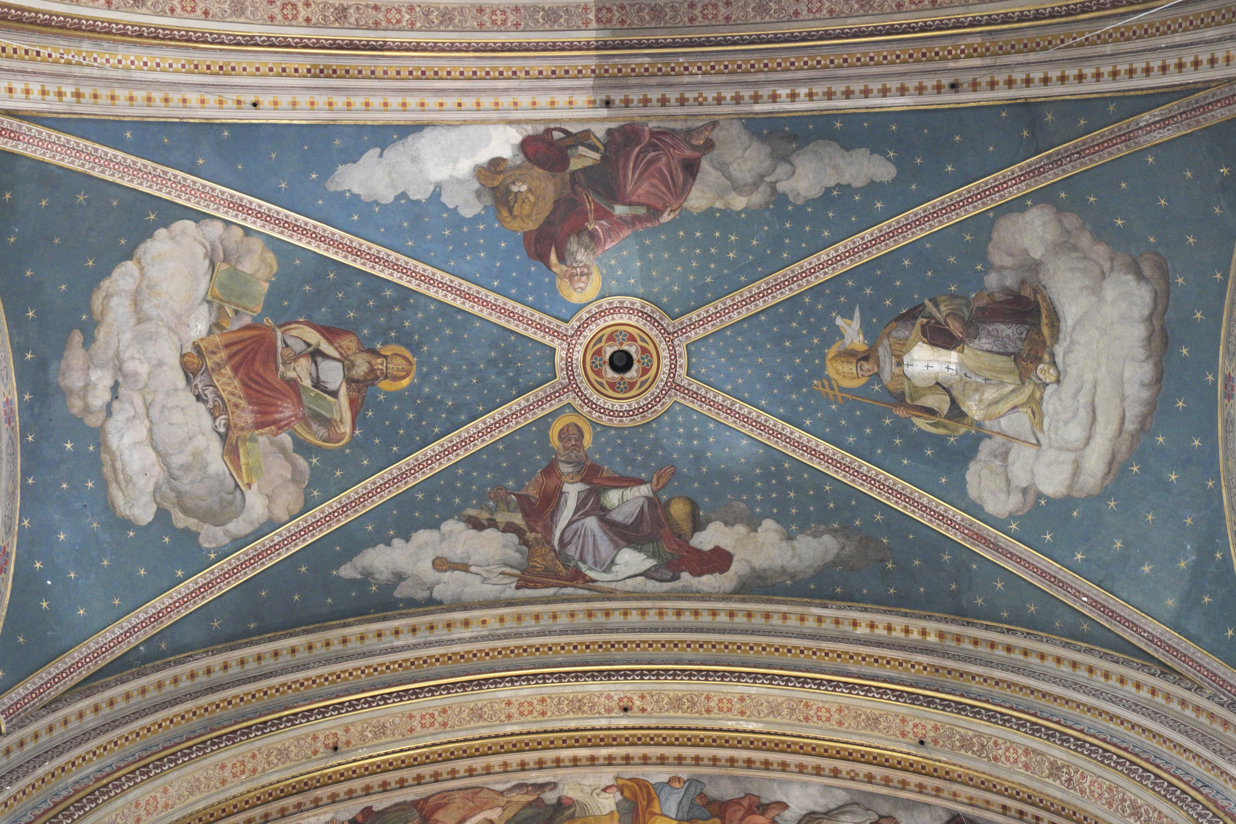 Katholische Pfarr- und Universitätskirche St. Ludwig in der Ludwigsstraße im Stadtbezirk Maxvorstadt in München (Bayern/Deutschland), Deckenfresko Die vier lateinischen Kirchenväter von Georg Lacher